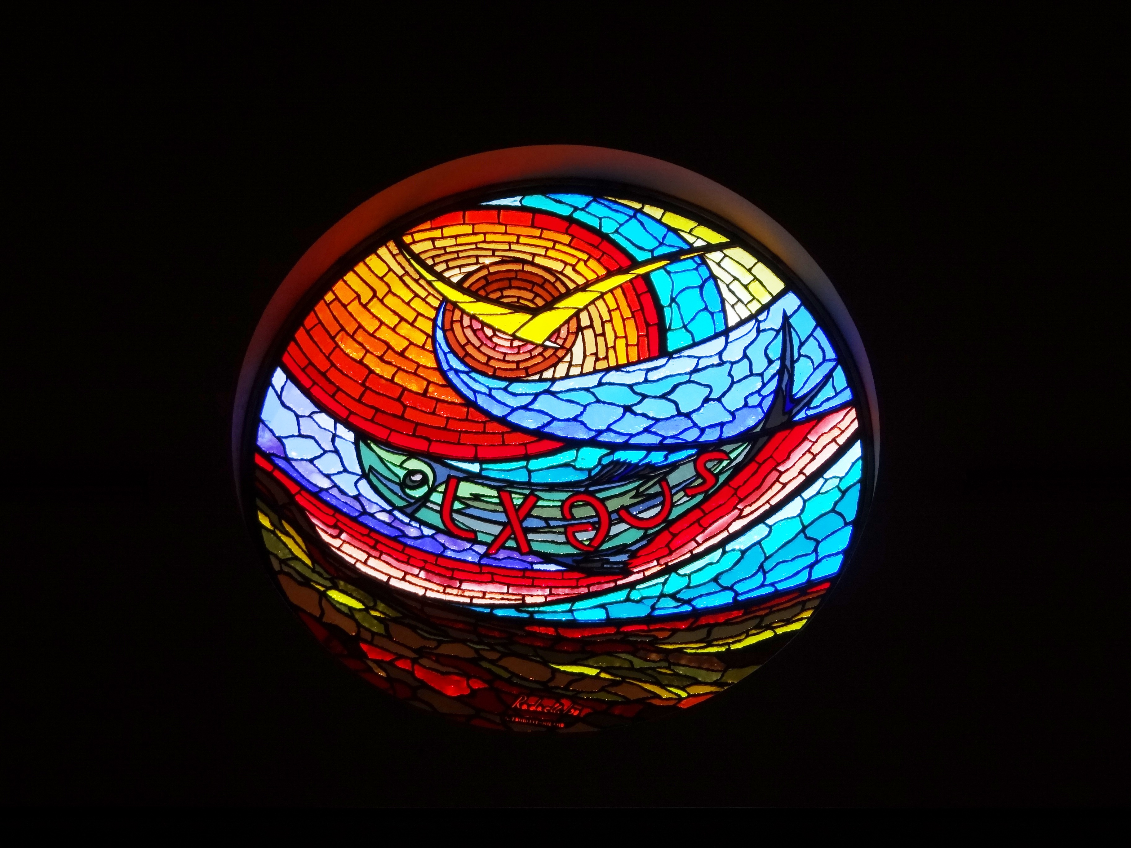 Saint Joseph's Latin Parish, Haifa Israel סיינט גוזף, הכנסייה הלטינית, שוכנת בחיפה בשדרות המגינים. מבני הקהילה כוללים ברת בית הספר כרמל בשדרות המגינים 76, מבנה הכנסייה בשדרות המגינים 78, ומבנה הקהילה בשדרות המגינים 80 אולם הכנסייה מבפנים, ויטראז חזית הכננסייה מבפנים